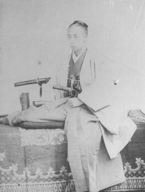 松平忠礼 Matudaira Tadanari